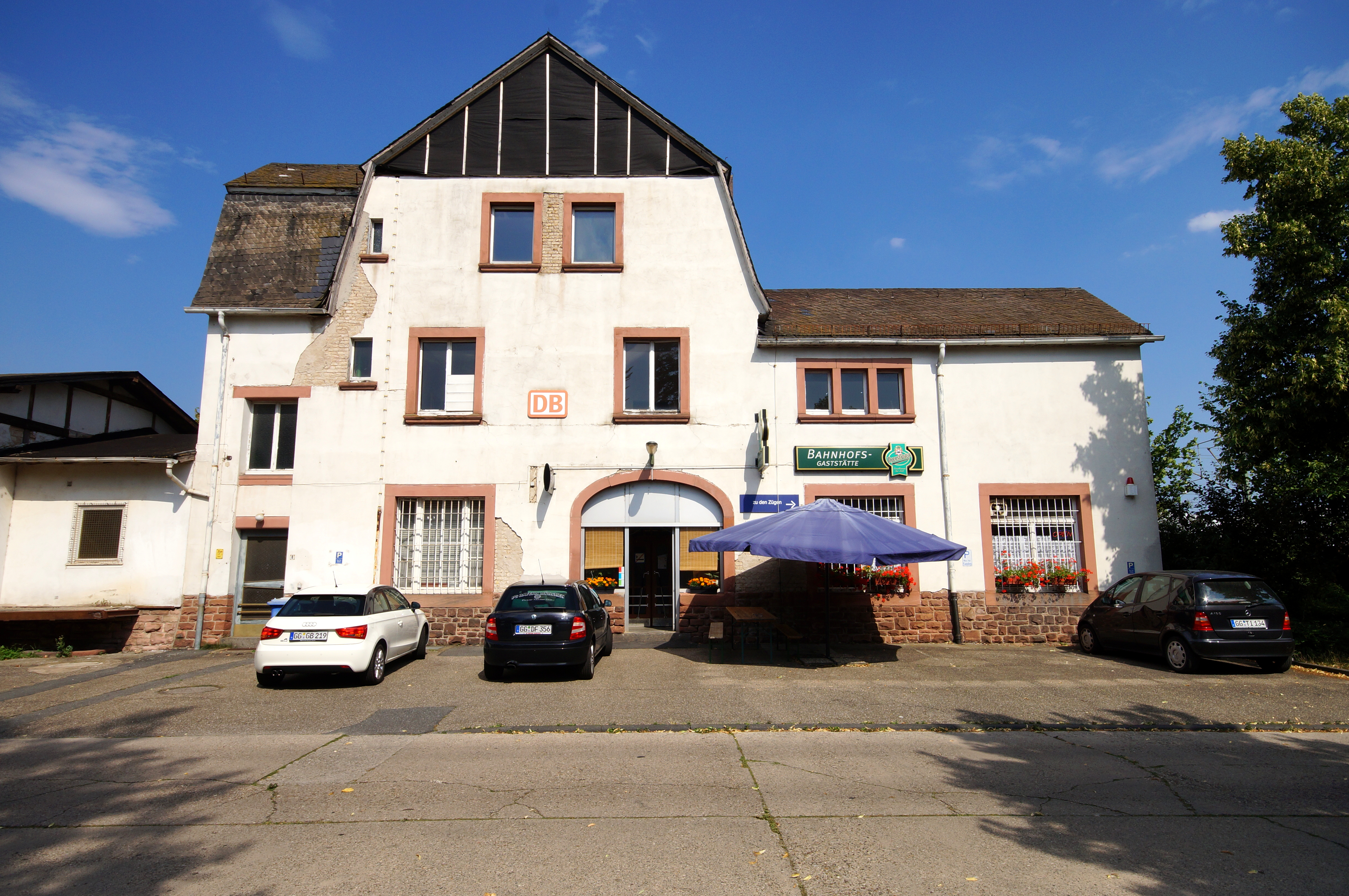 Das Bahnhofsgebäude des Bahnhofs von Biebesheim am Rhein